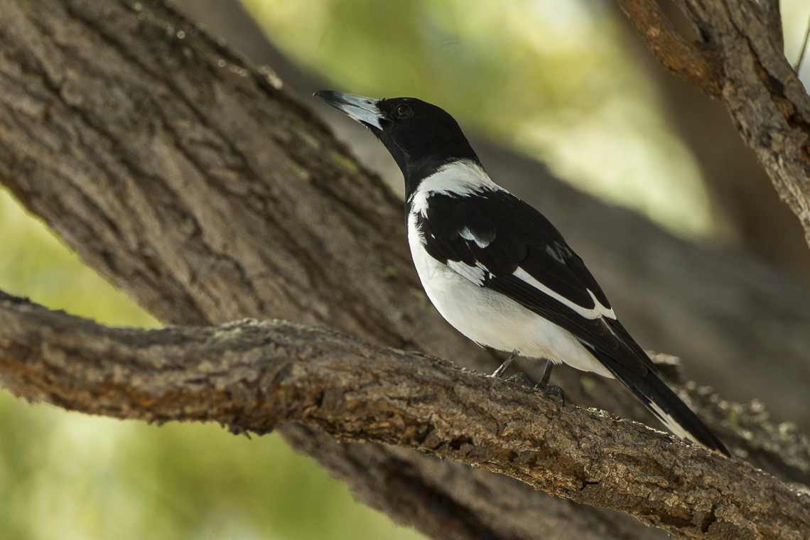 Pied Butcherbird - Kingfisher Park - Queensland_S4E0532